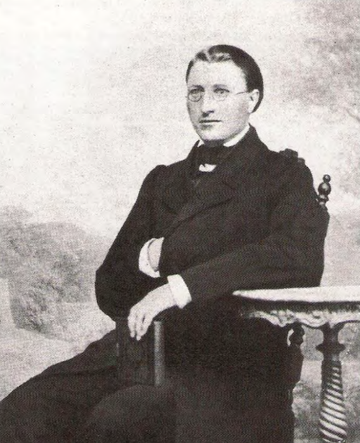 Hornjoserbsce: Korla Awgust Jenč